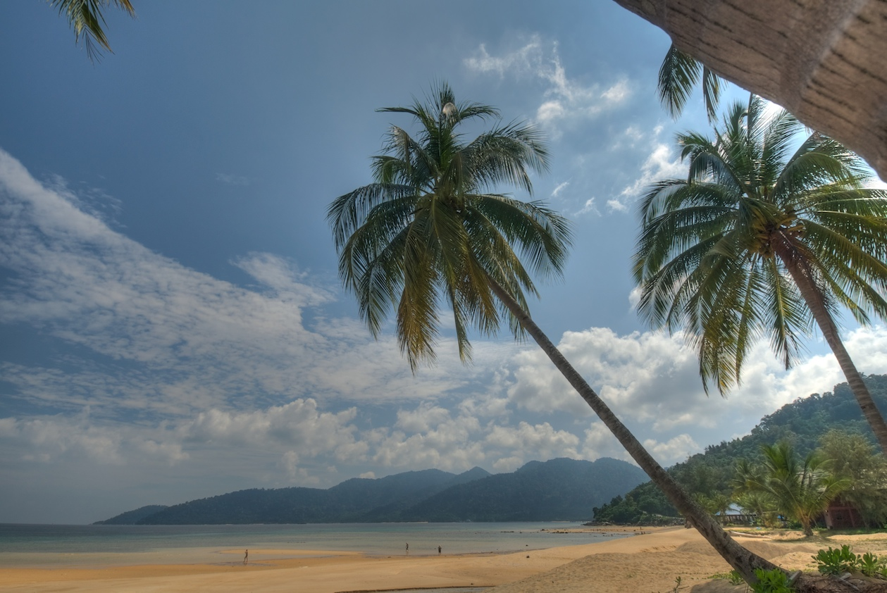 Tioman island, Malaysia